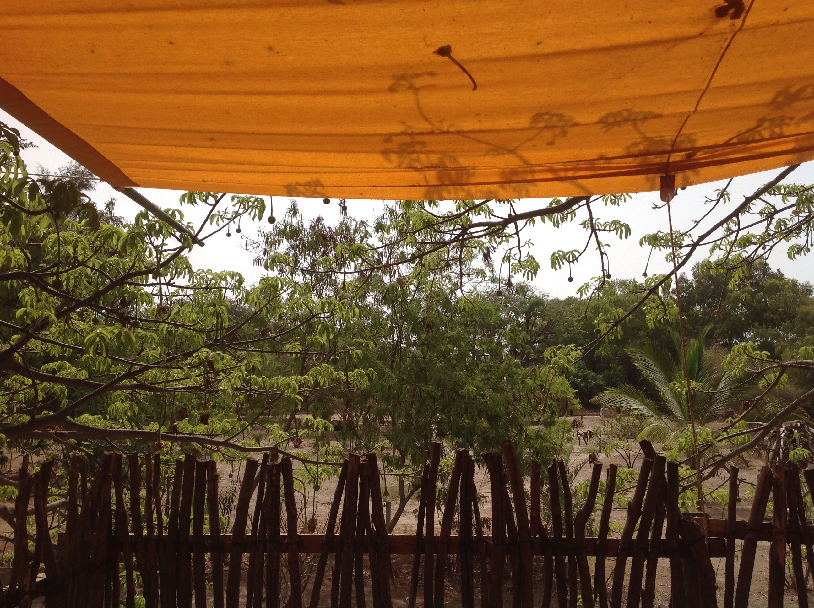 terraza en los árboles tomada desde un campamento en Palmarín (Senegal)